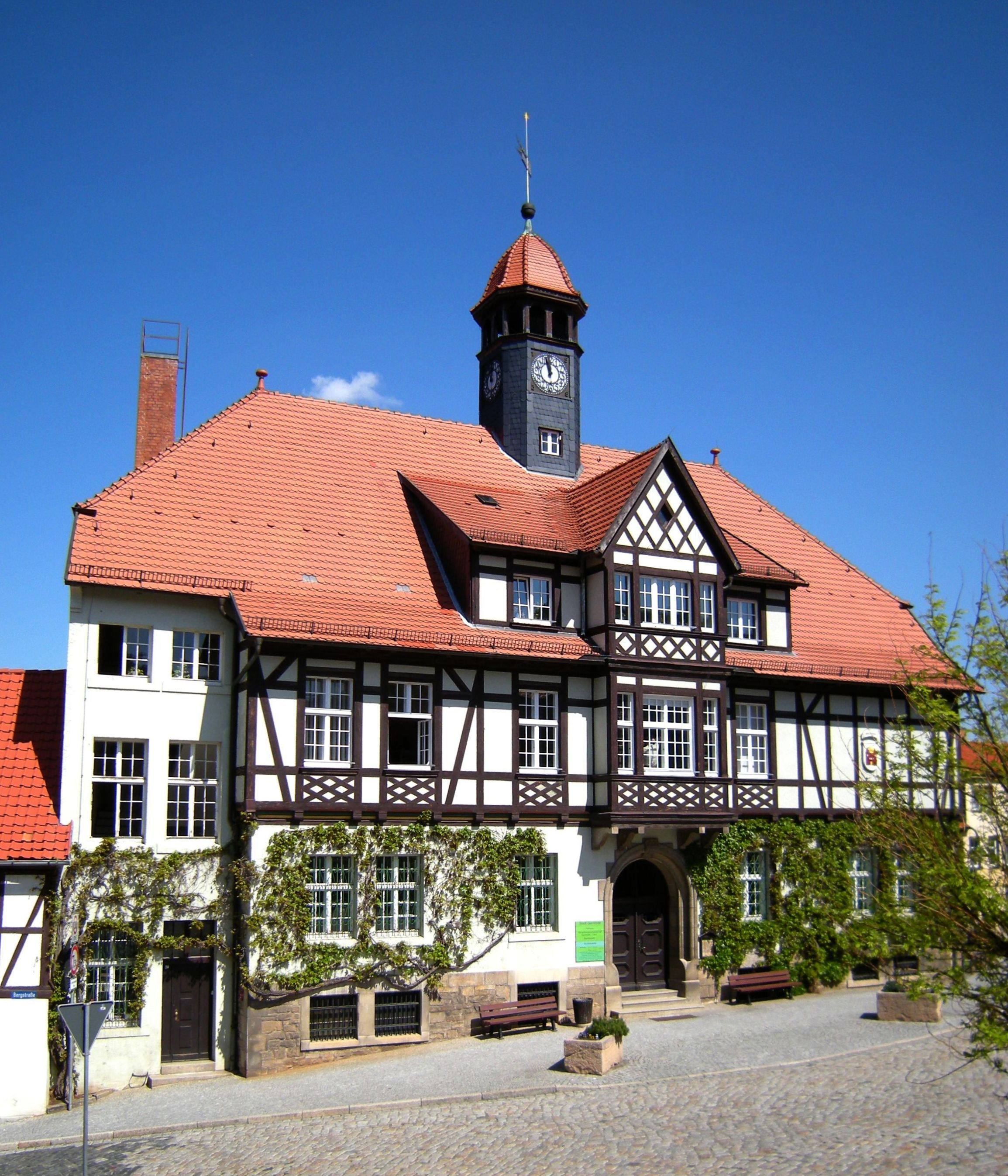 Gernrode - Fachwerk-Rathaus.jpg